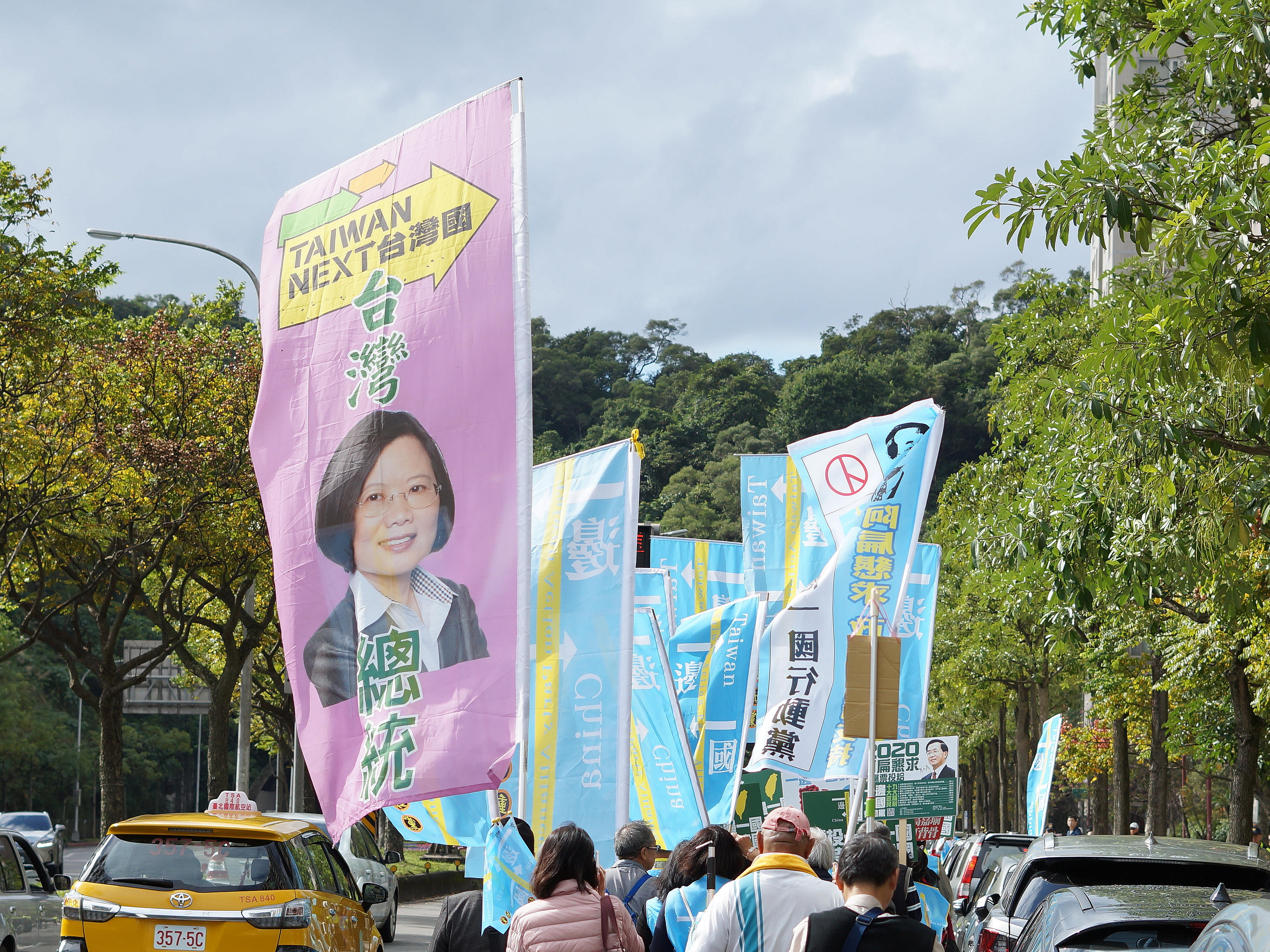 臺北市內湖區，一邊一國行動黨結束赴民主進步黨臺北市議員高嘉瑜服務處抗議行動，群眾轉赴一邊一國行動黨立法委員候選人郭正典競選總部休息。此為群眾沿途高舉的支持中華民國總統蔡英文連任桃太郎旗與一邊一國行動黨桃太郎旗。